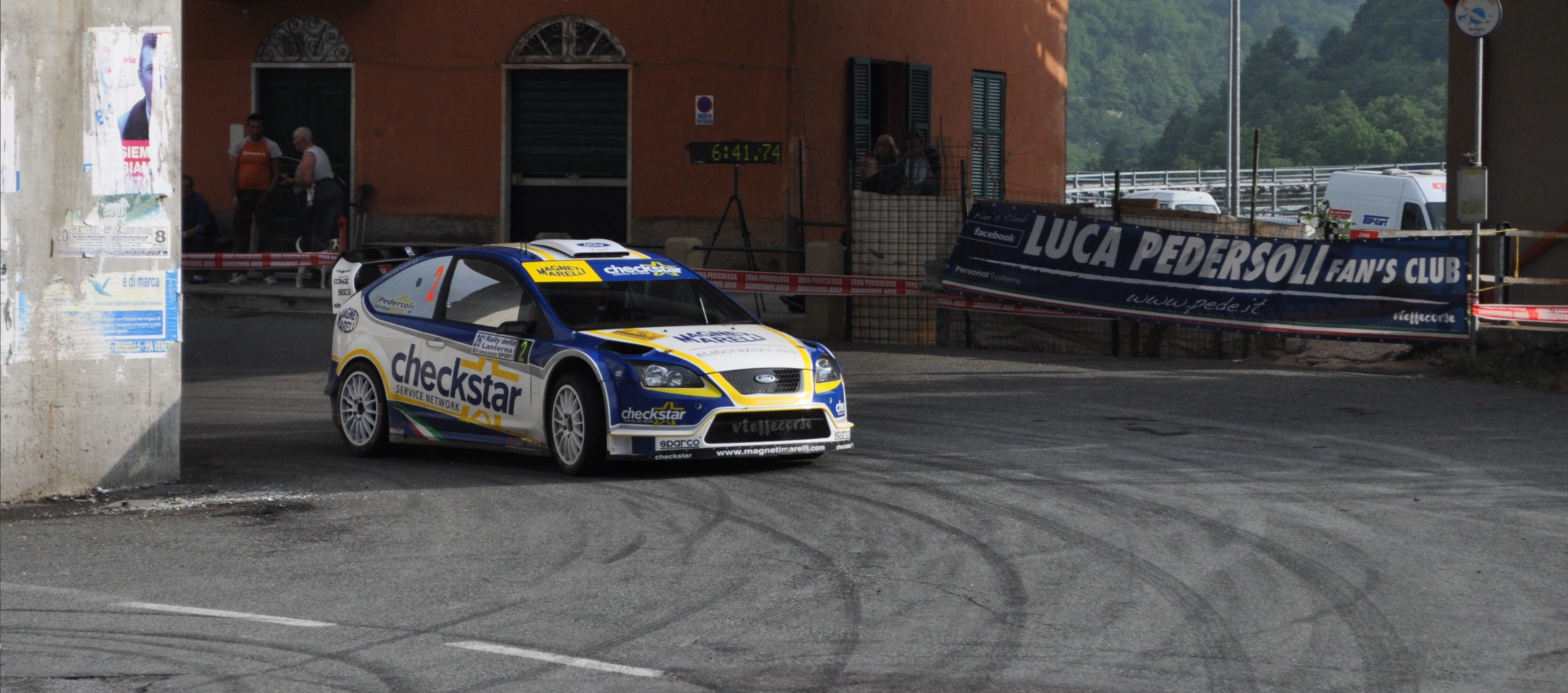 Luca Pedersoli in azione al Rally della Lanterna 26° edizione